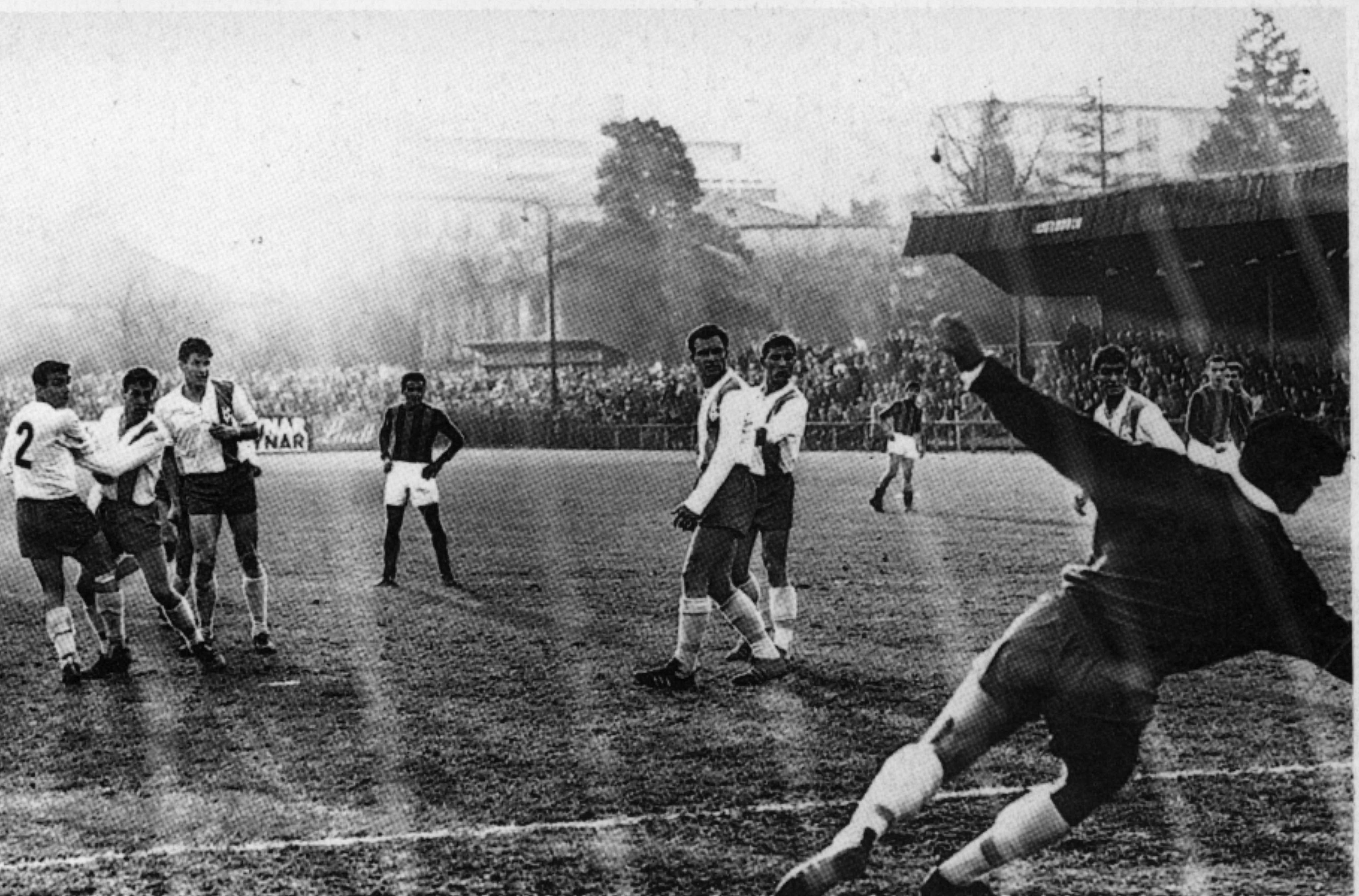 Chiasso, il Campo Comacini in un'immagine del 1968.